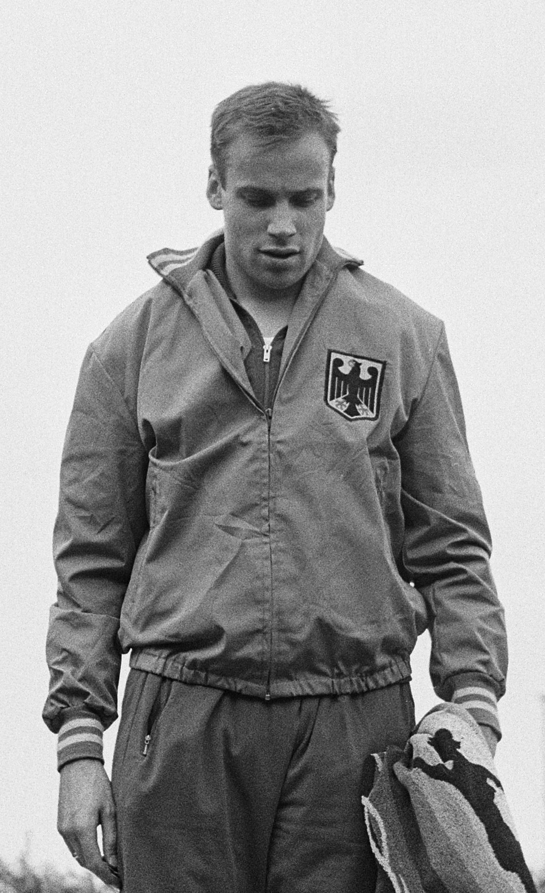 Zes Landen Atletiek in Enschede. Huldigingsceremonie 800 meter. M. Kinder (Duitsland) )